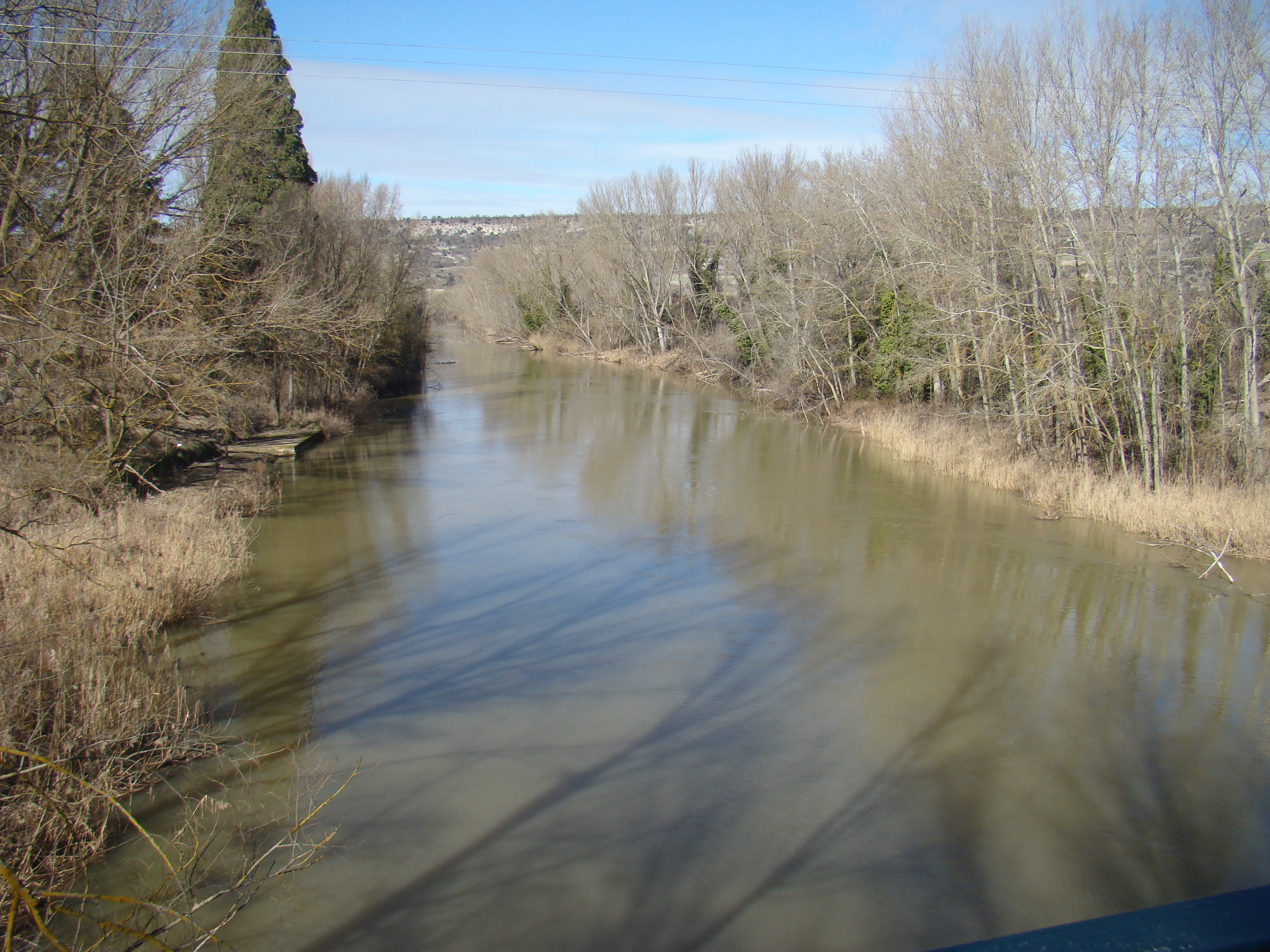 Río Duero a su paso por Sardón de Duero, Valladolid, España.